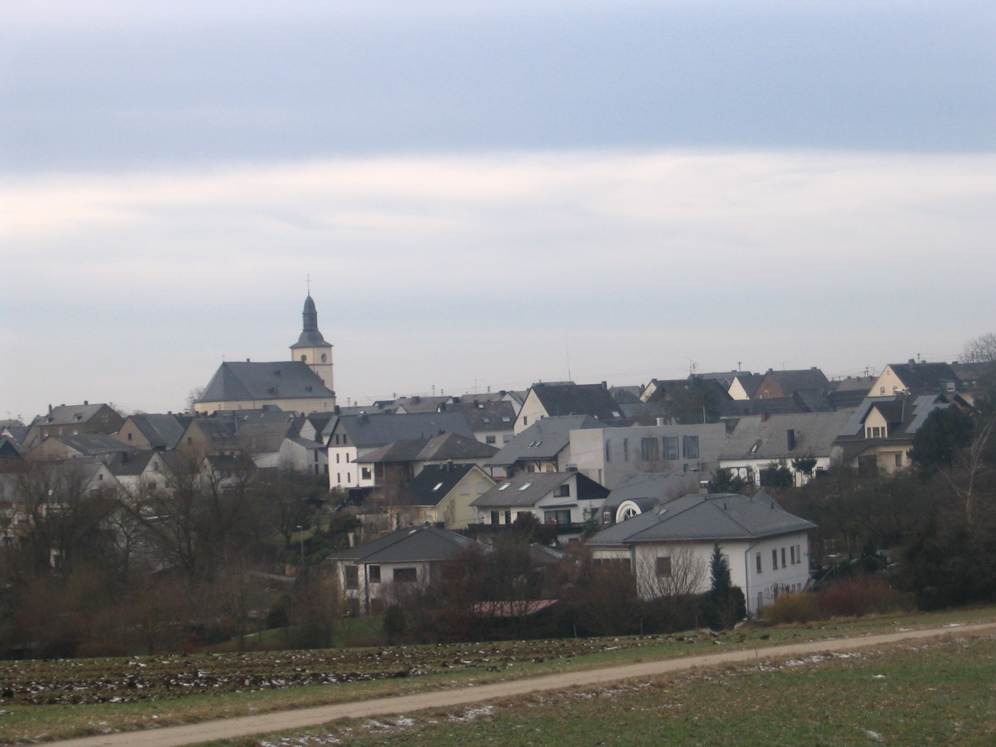 Mörsdorf aus Richtung Süden